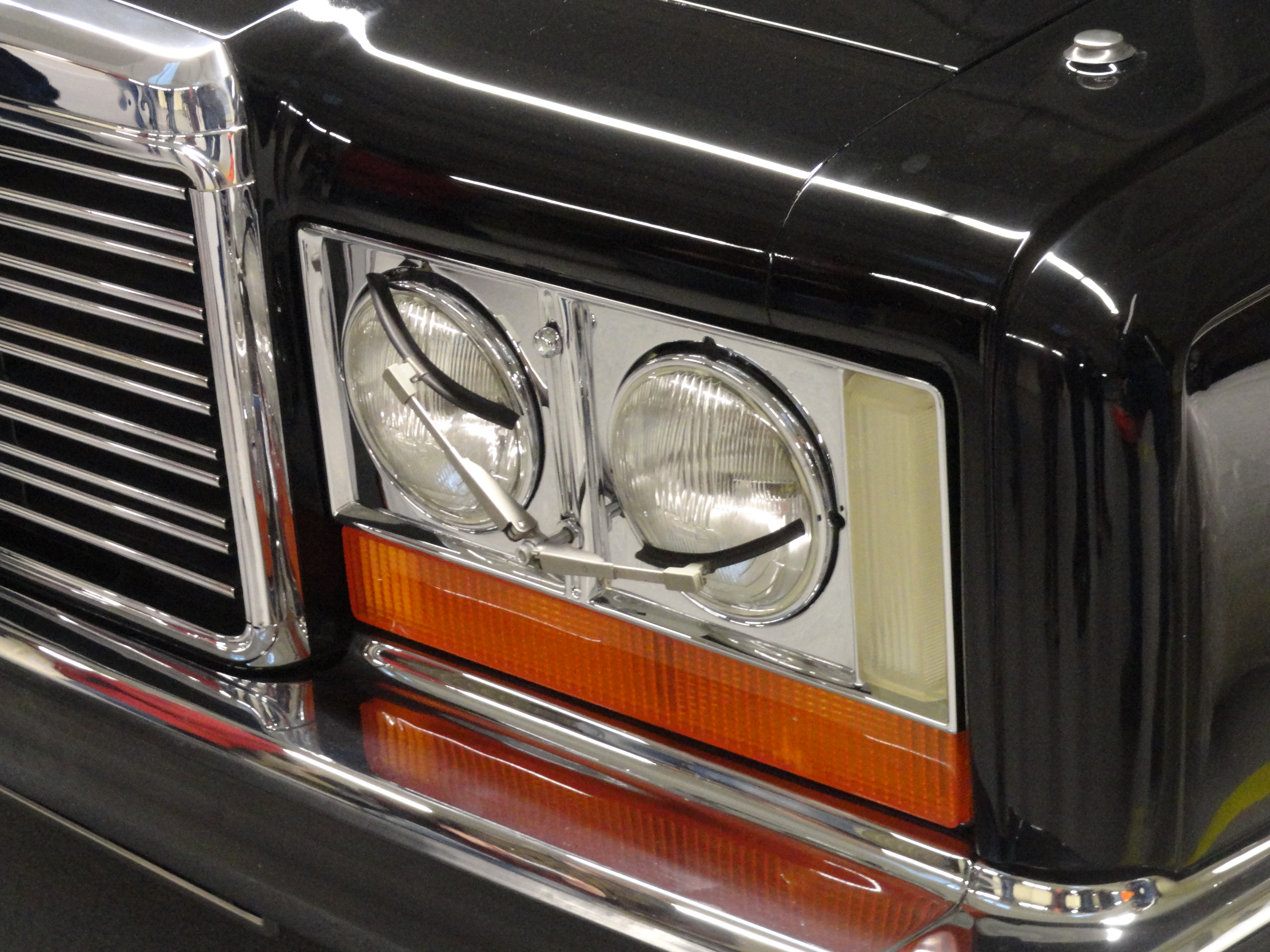 Дворники на фарах автомобиля представительского класса ЗиЛ 41045. На фото представлен автомобиль из колекции В Ф. януковича в Межгорье.